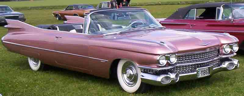 1959 Cadillac Series 59-6267F Convertible Coupe